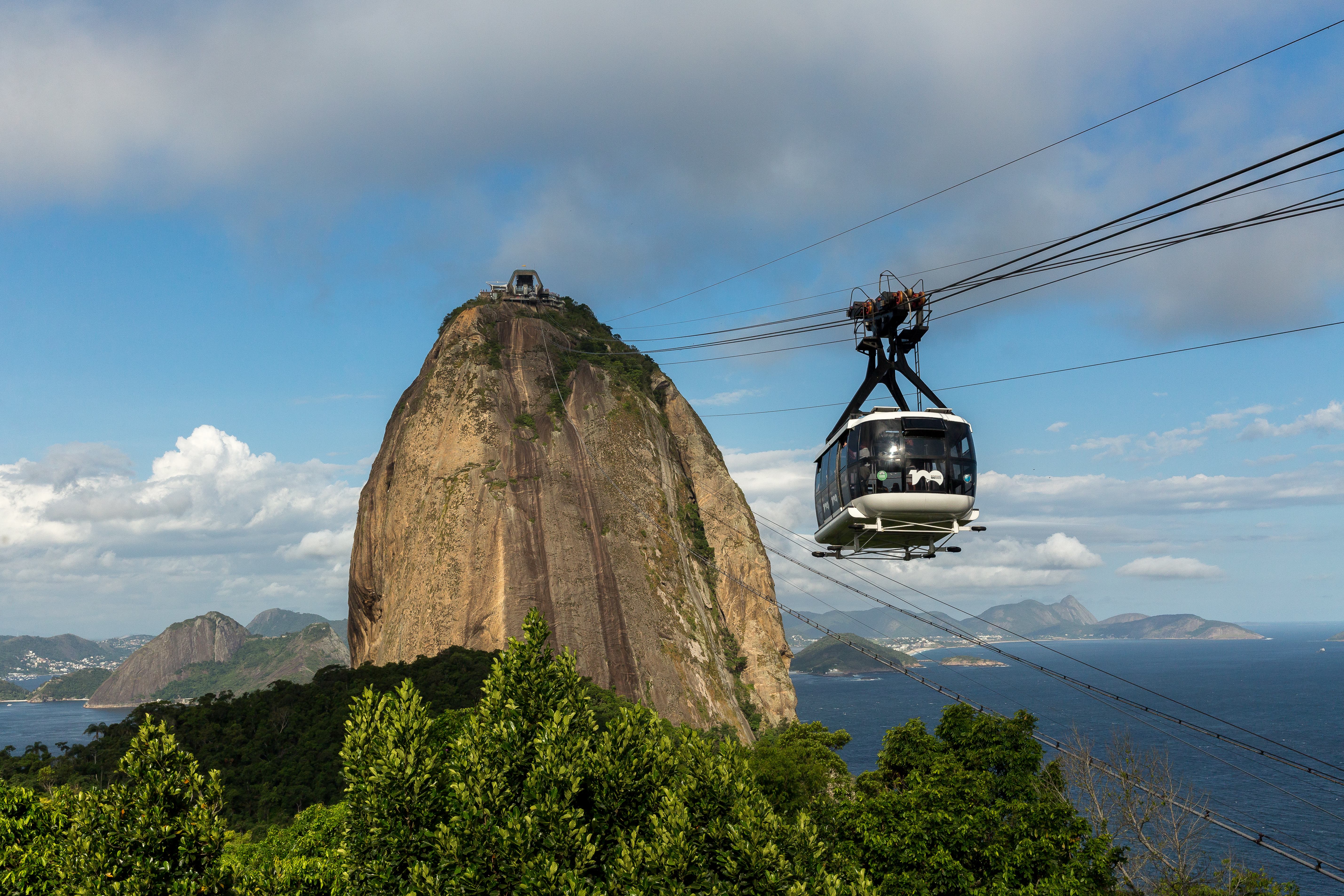 Bondinho do Pão de Açúcar, Rio de Janeiro - RJ - Brasil